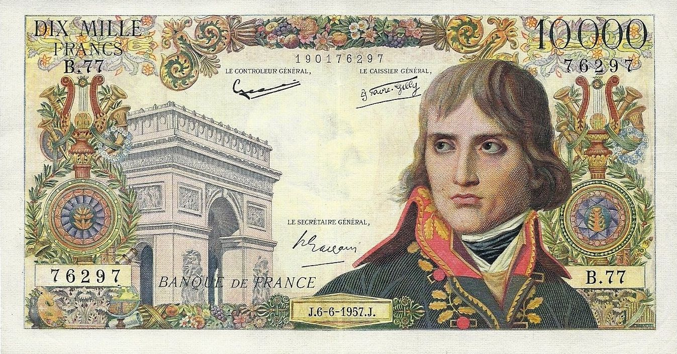 10 000 francia frank bankjegy, Bonaparte-típus 1957.